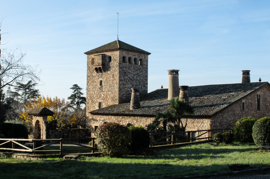 Torre de Ca N'Ustrell, a la comarca del Vallès Occidental, Catalunya